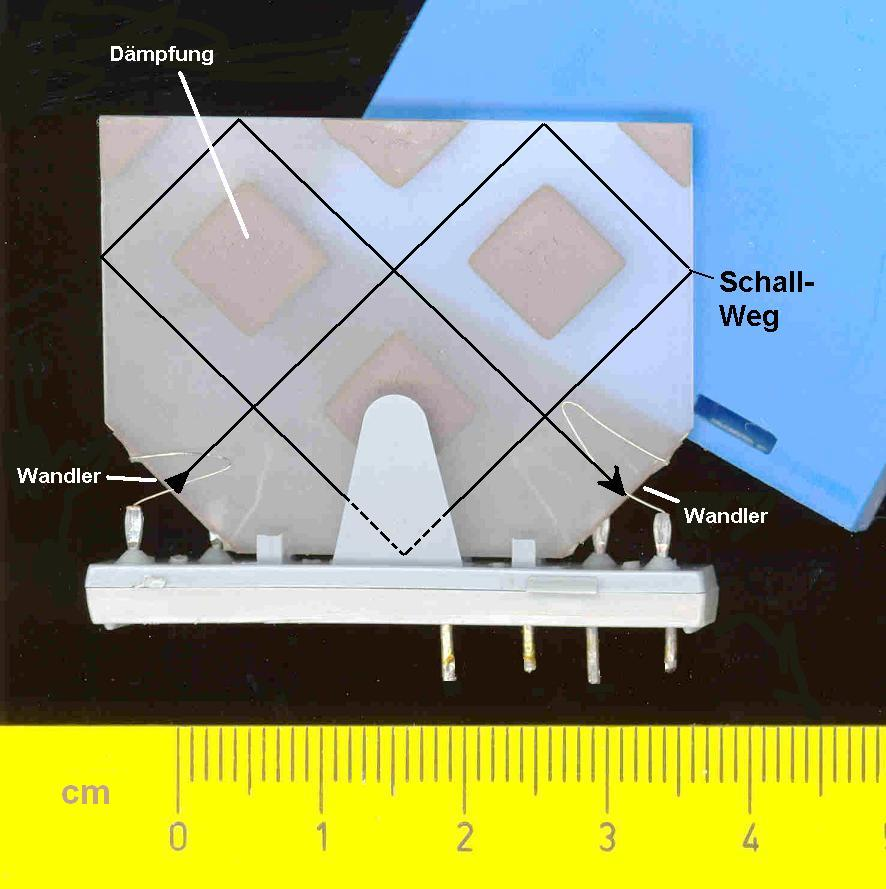 Akustische Verzögerungsleitung aus Farbfernseher, tv = 64µs, VEB ELFEMA Mittweida, ca. 1980 andere Versionen: VZLe.jpg - elektrische Verzögerungsleitung